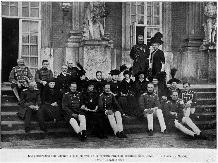 Fotografia dell'imperatore Guglielmo II di Germania con consorte e membri della famiglia imperiale tedesca